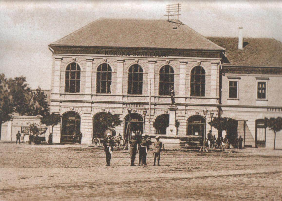 Korona szálloda a xx. század elején (1905)